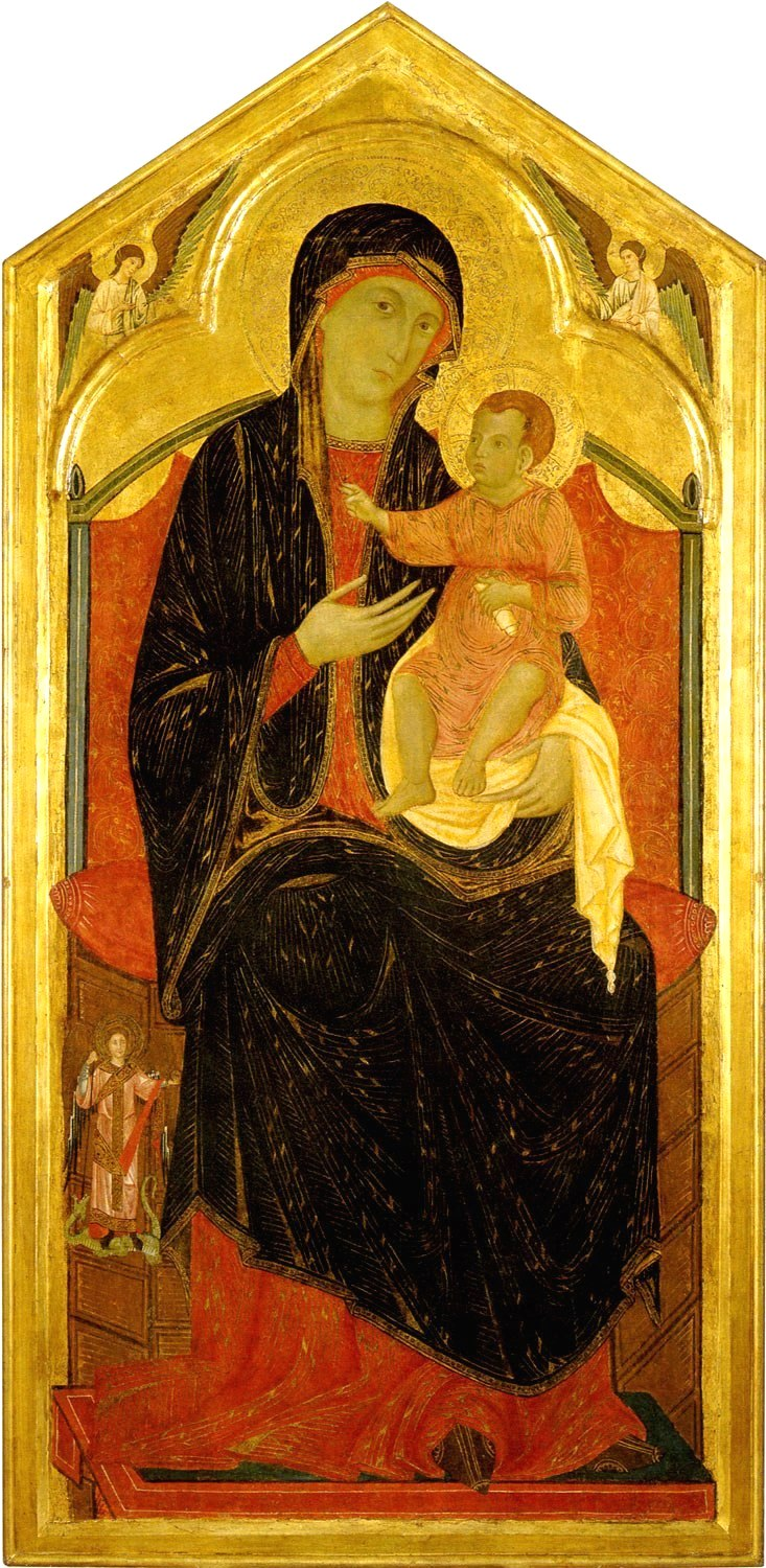 The Madonna and Child Enthroned - 1285-95. Chiesa di San Regolo, Montaione, provincia di Firenze